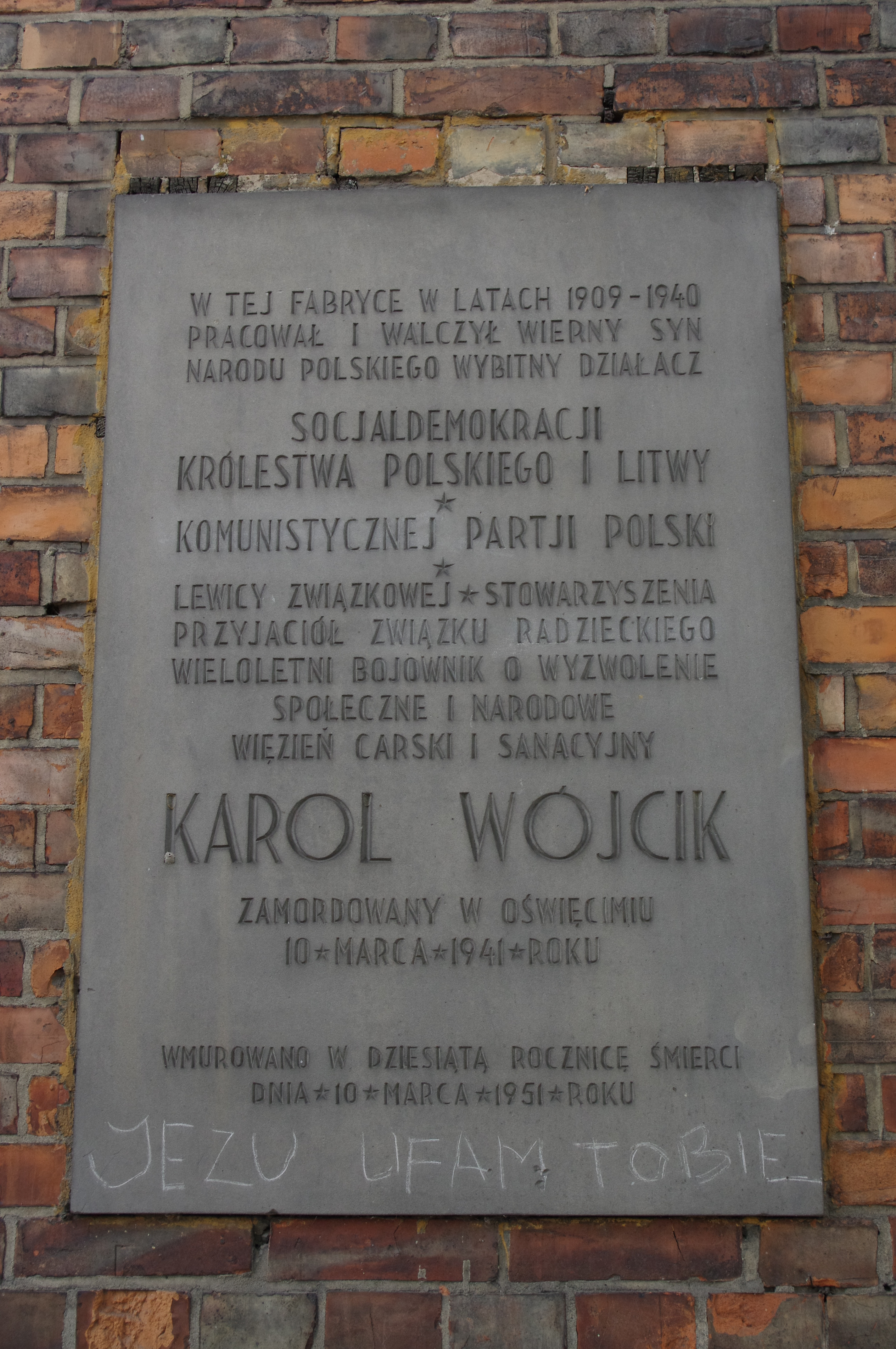 Tablica upamiętniająca Karola Wójcika na budynku dawnej Fabryki Drutu im. Karola Wójcika (wcześniej Belgijska Fabryka Drutu w Warszawie) gdzie Karol Wójcik pracował w latach 1909-1940 na ul. Objazdowej 1 w Warszawie